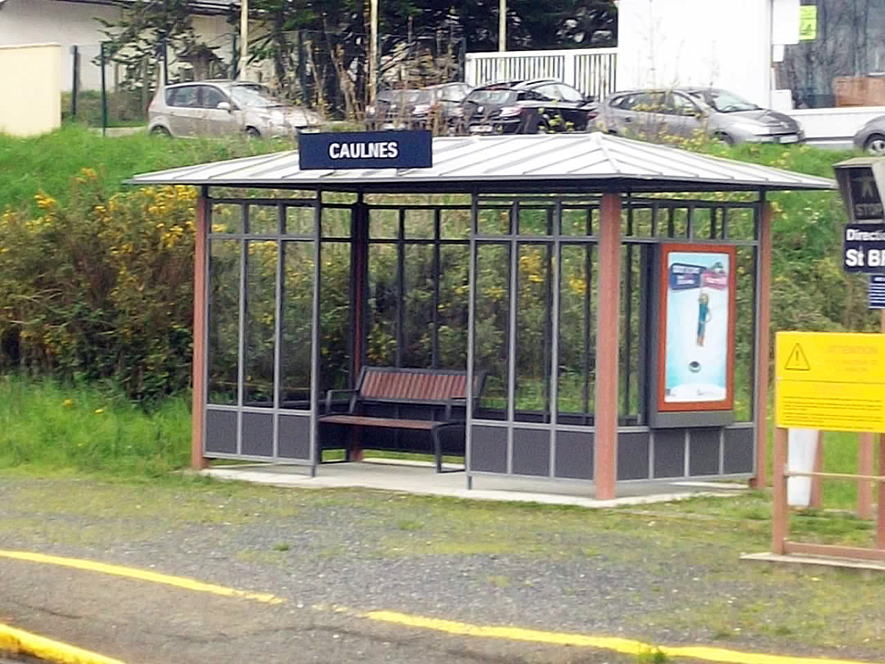 2ème abri quai côté st brieuc